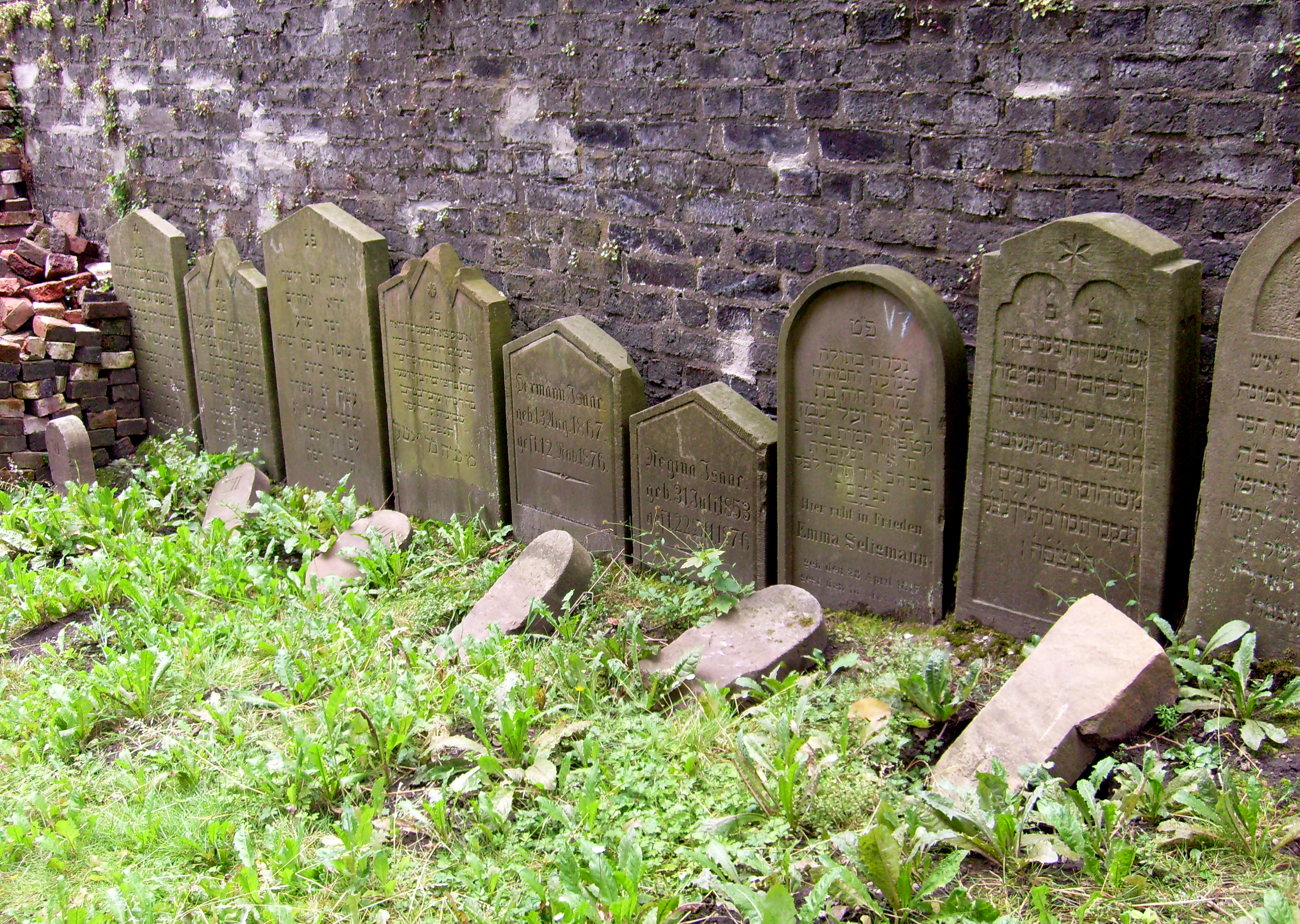 Grabsteine aus Neviges auf dem Ruhenden Jüdischen Friedhof an der Weißenburgstraße in Wuppertal-Elberfeld. Im Jahr 1961 wurden die Grabsteine von einem Friedhof in Neviges nach Wuppertal gebracht und auf Betonsockeln entlang der Ziegelmauer aufgestellt.